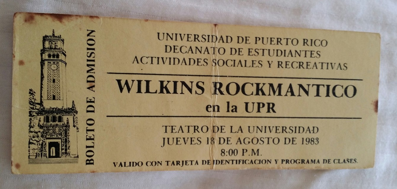 Boleto de entrada para concierto de Wilkins en teatro UPR.